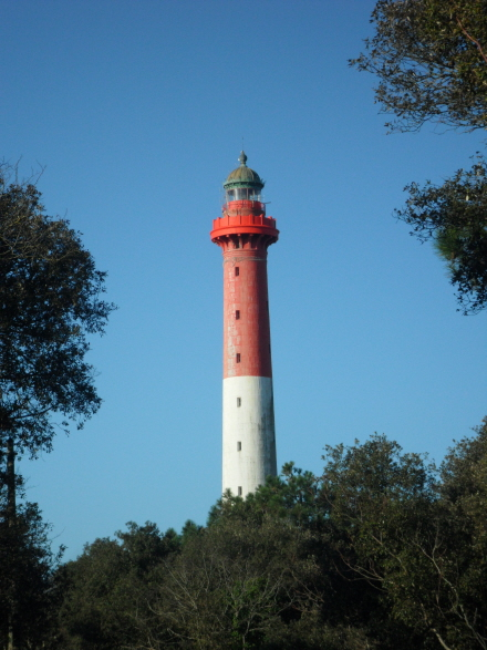 Le phare de la Coubre en 2012